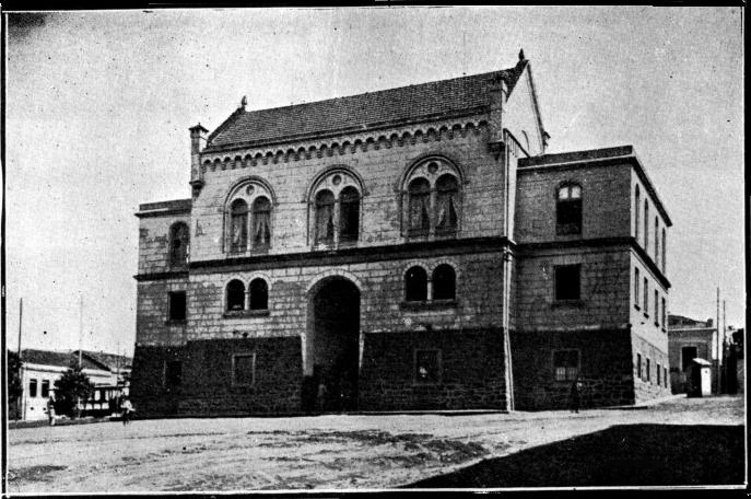 Antigo Forum de São Carlos, actual Câmara Municipal.